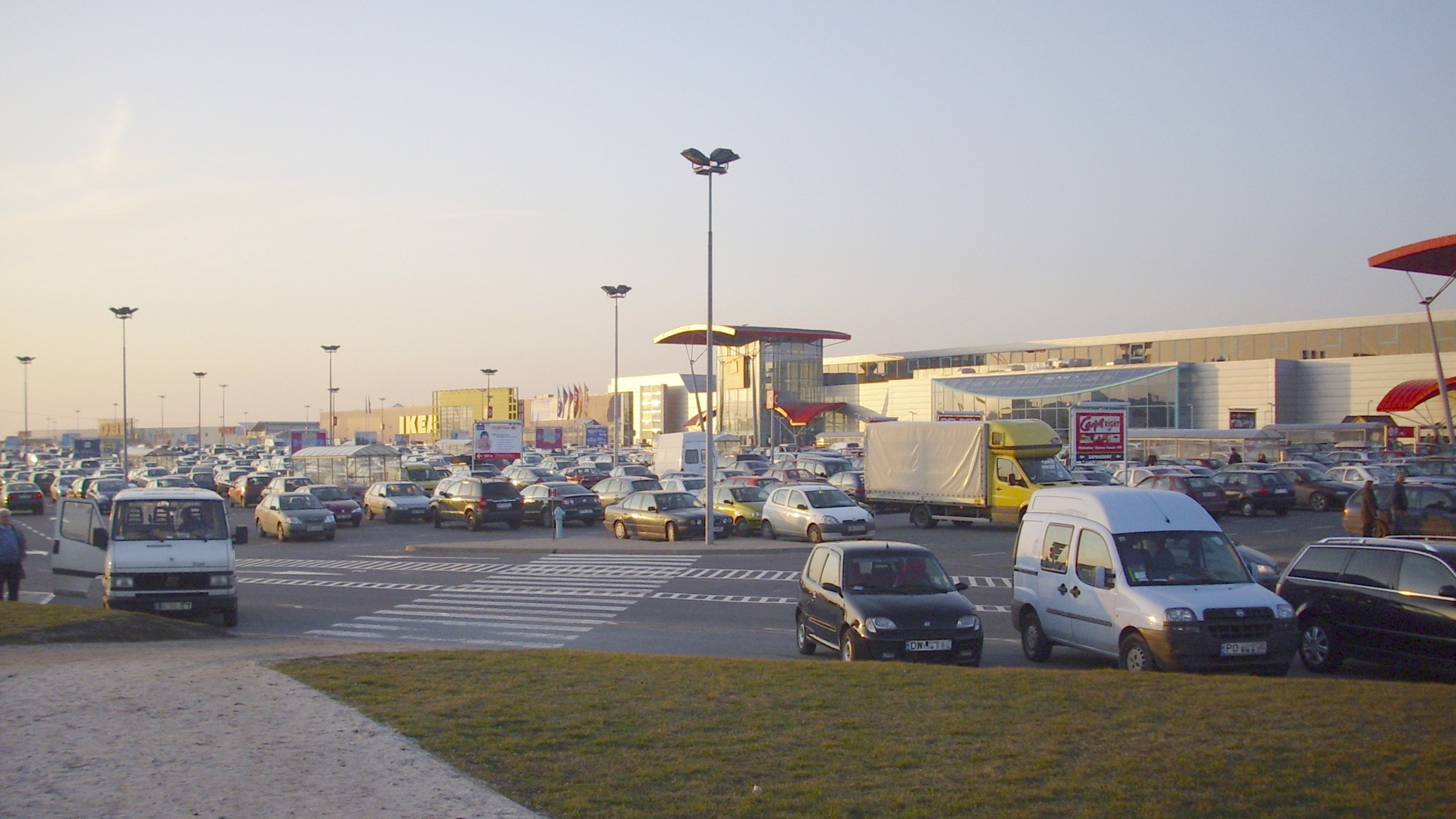 Bialany Wrocławskie (woj dolnośląskie, Polska). Centrum Handlowe „Aleja Bielany”.